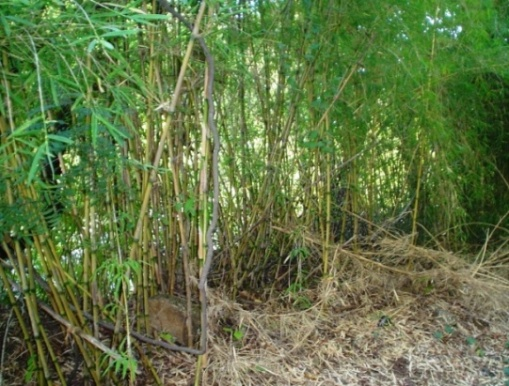 Matorral de colihue (Chusquea culeou) en San Fabián, VIII Región, Chile